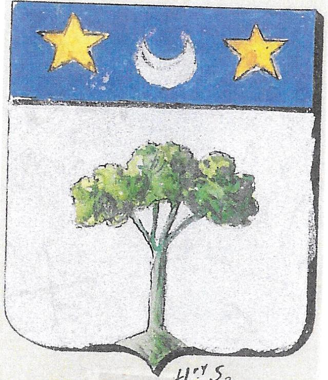 Blason des Castaniers